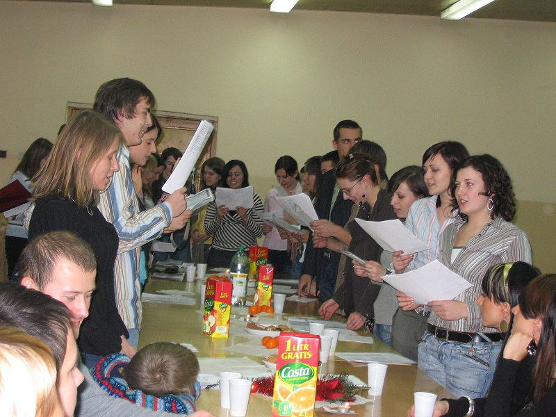 Slawiści z Uniwersytetu w Bielsku- Białej